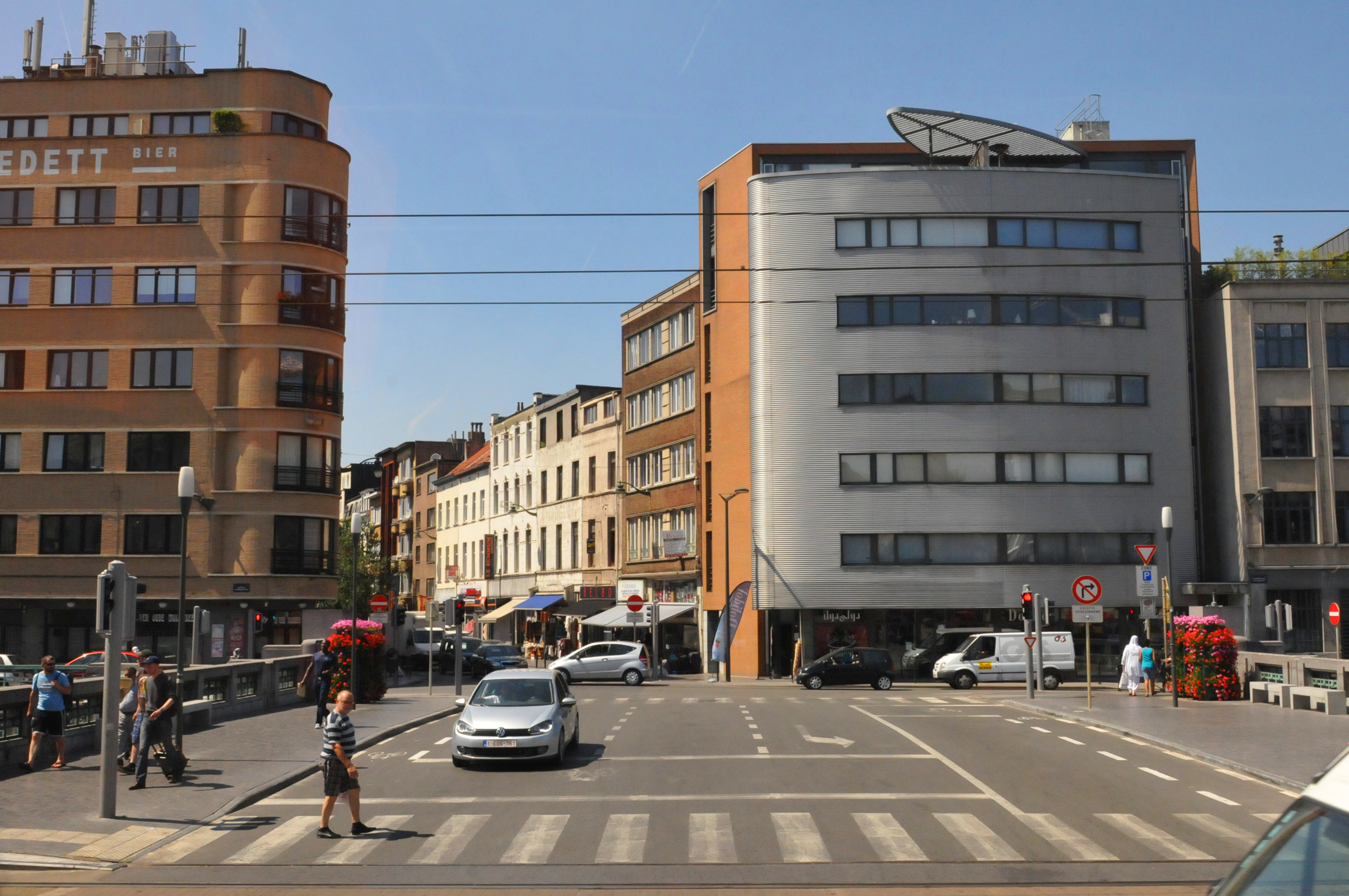 Dansaert, 1000 Brussel, Belgium